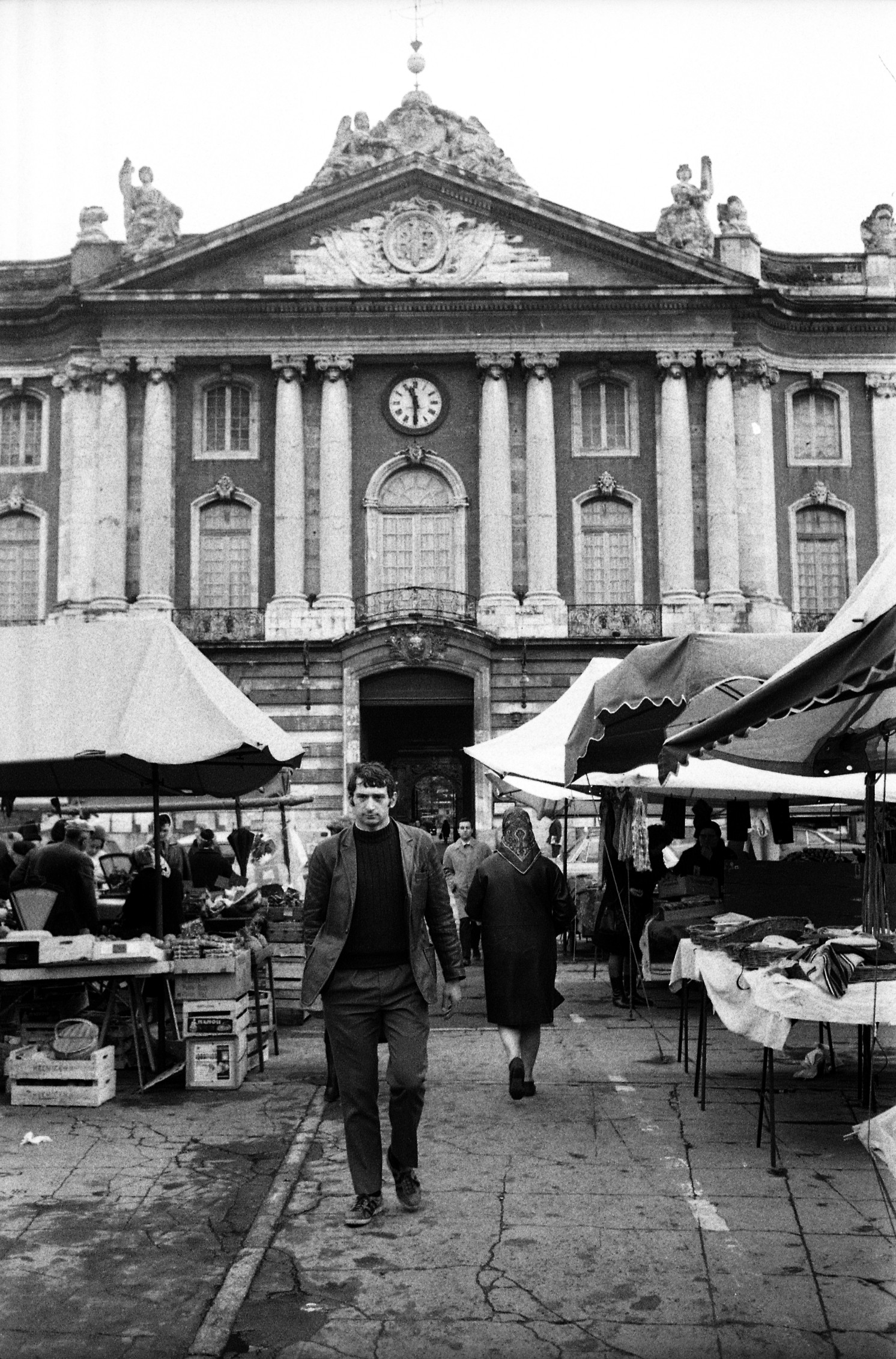 Place du Capitole. Le 3 février 1970. Vue de Pierre Villepreux, joueur du Stade Toulousain, sur la place du Capitole pendant le marché.